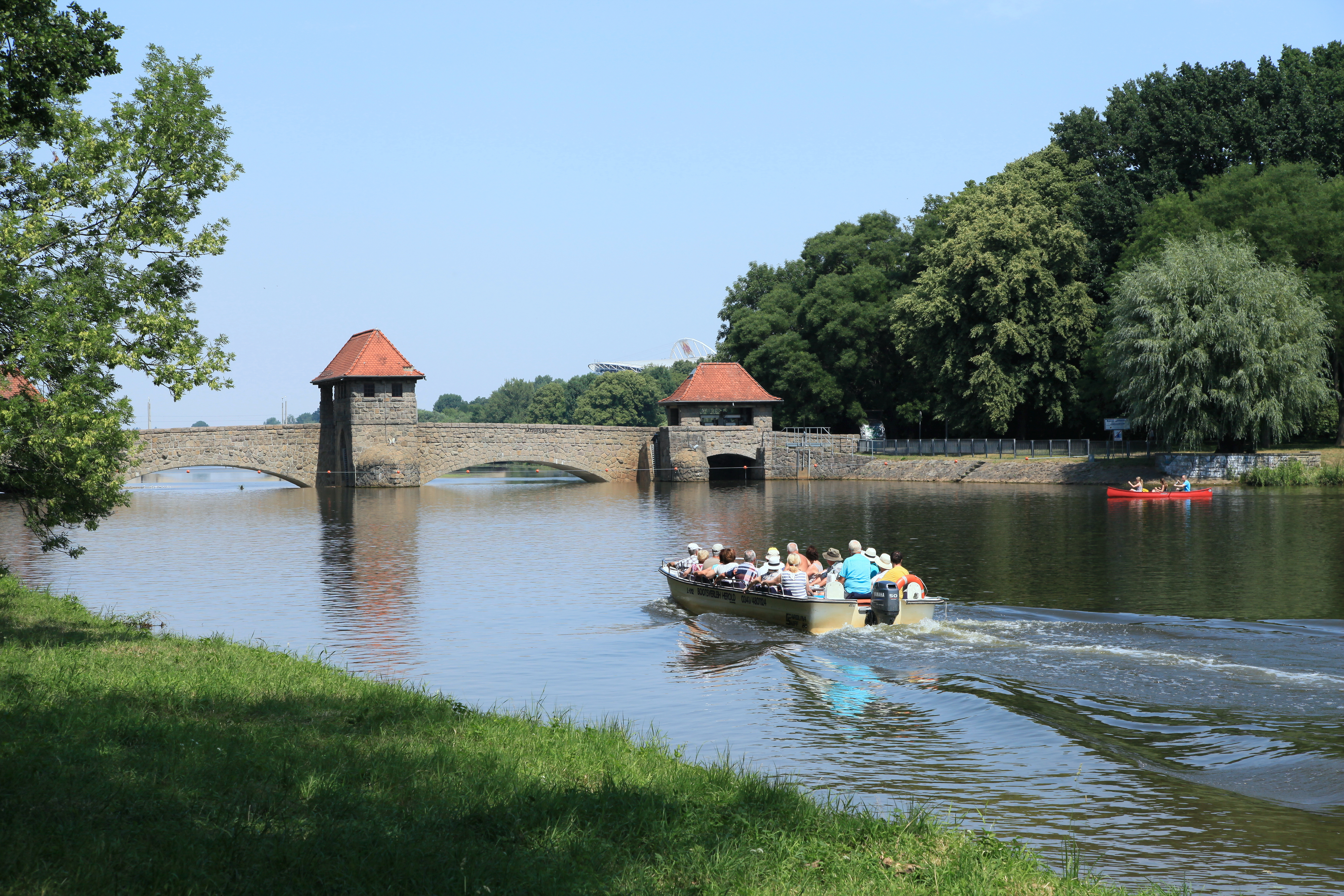 Elsterflutbett mit Palmengartenwehr in Leipzig